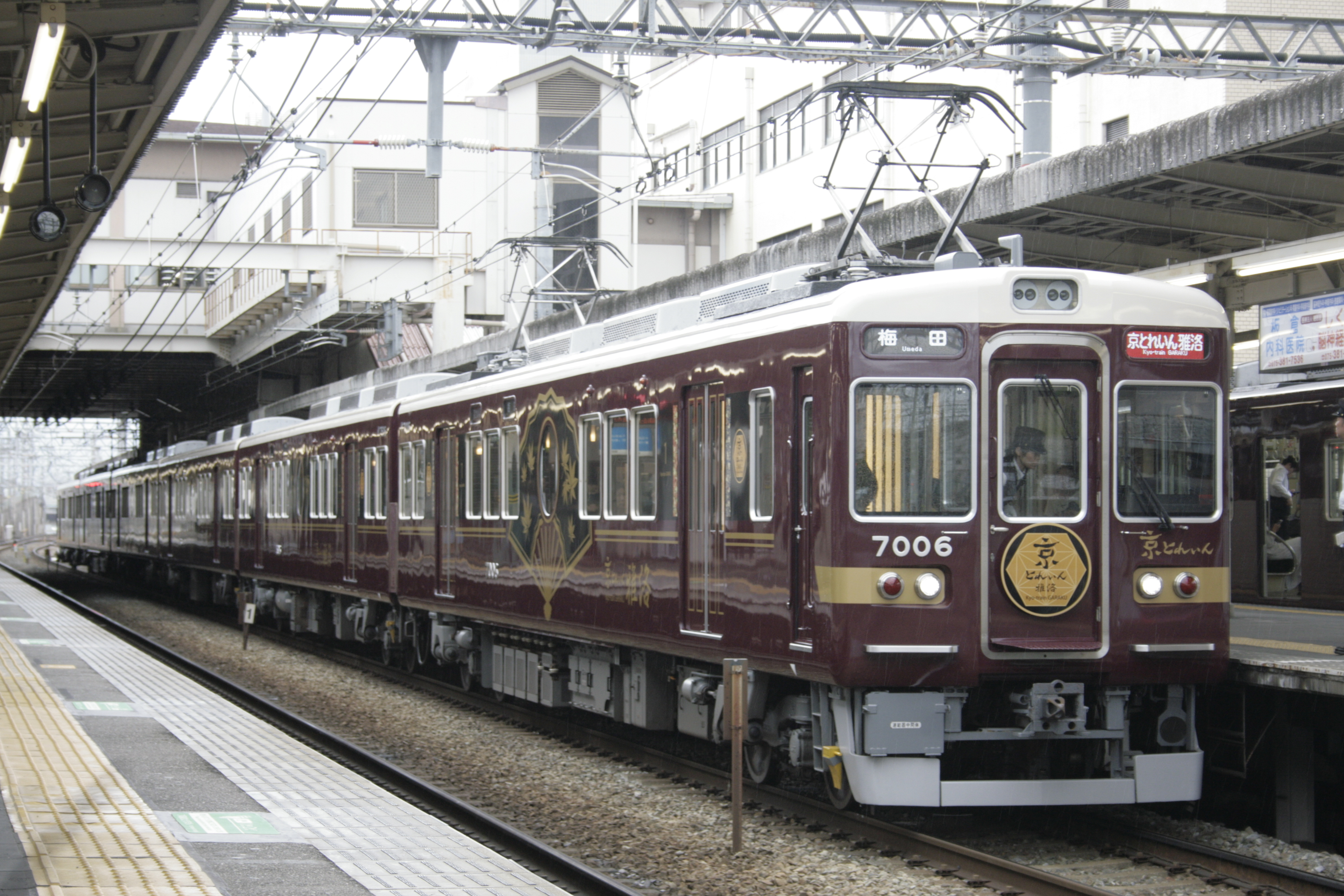 2019年7月14日 桂駅より撮影。